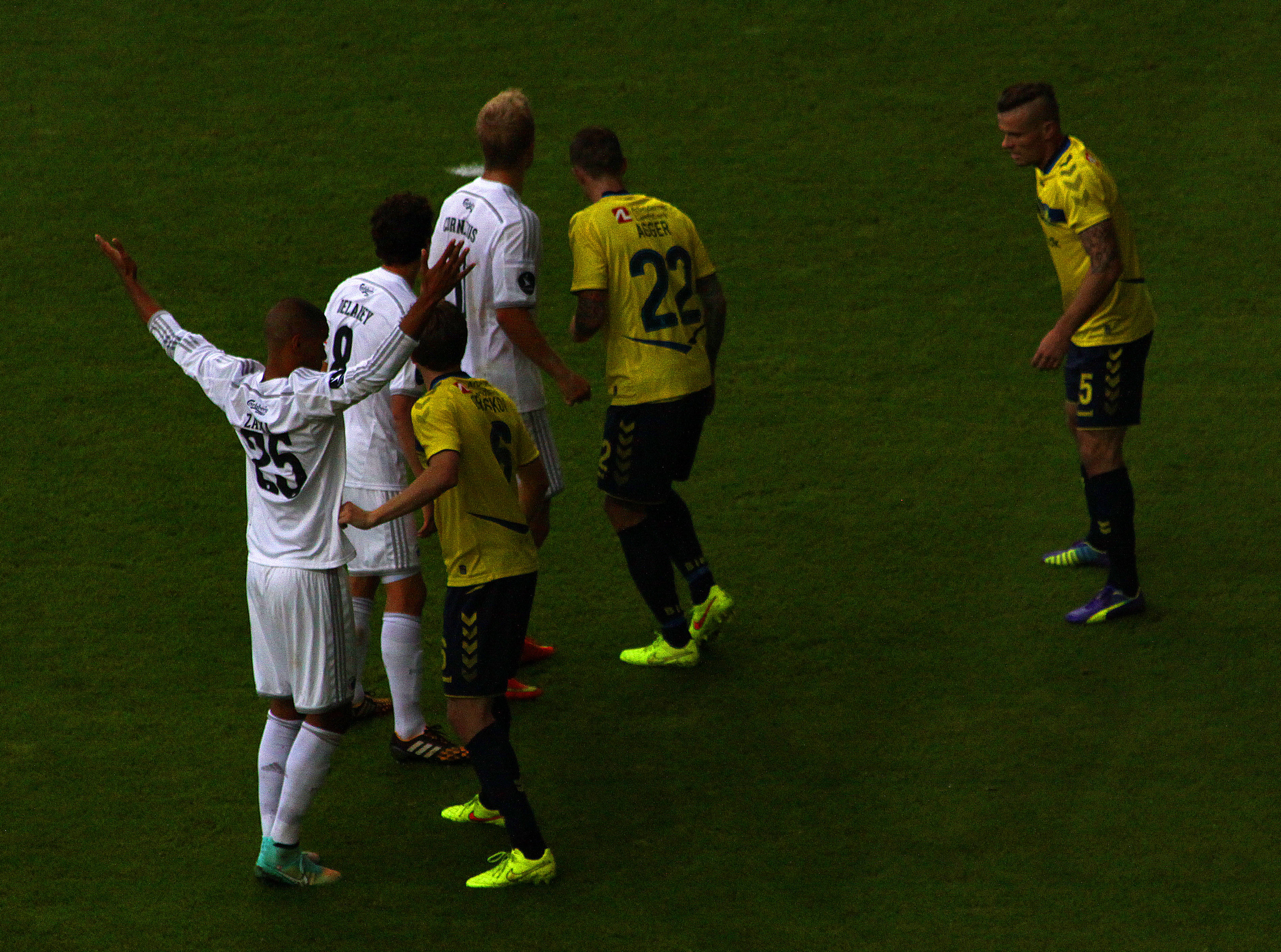 København / Copenhagen. FCK - Brøndby i Parken.